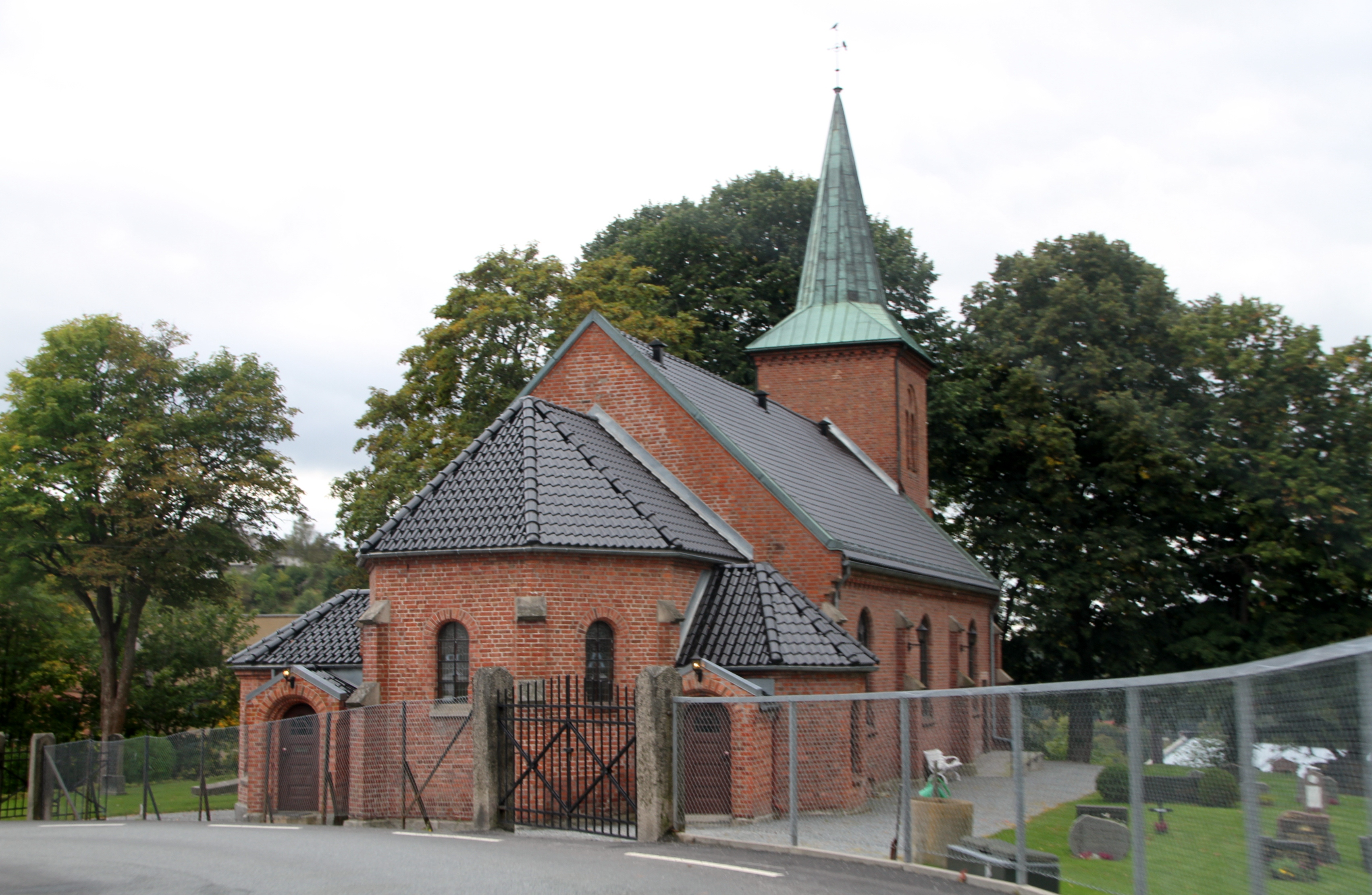 Tistedal church, east of Halden city, Norway